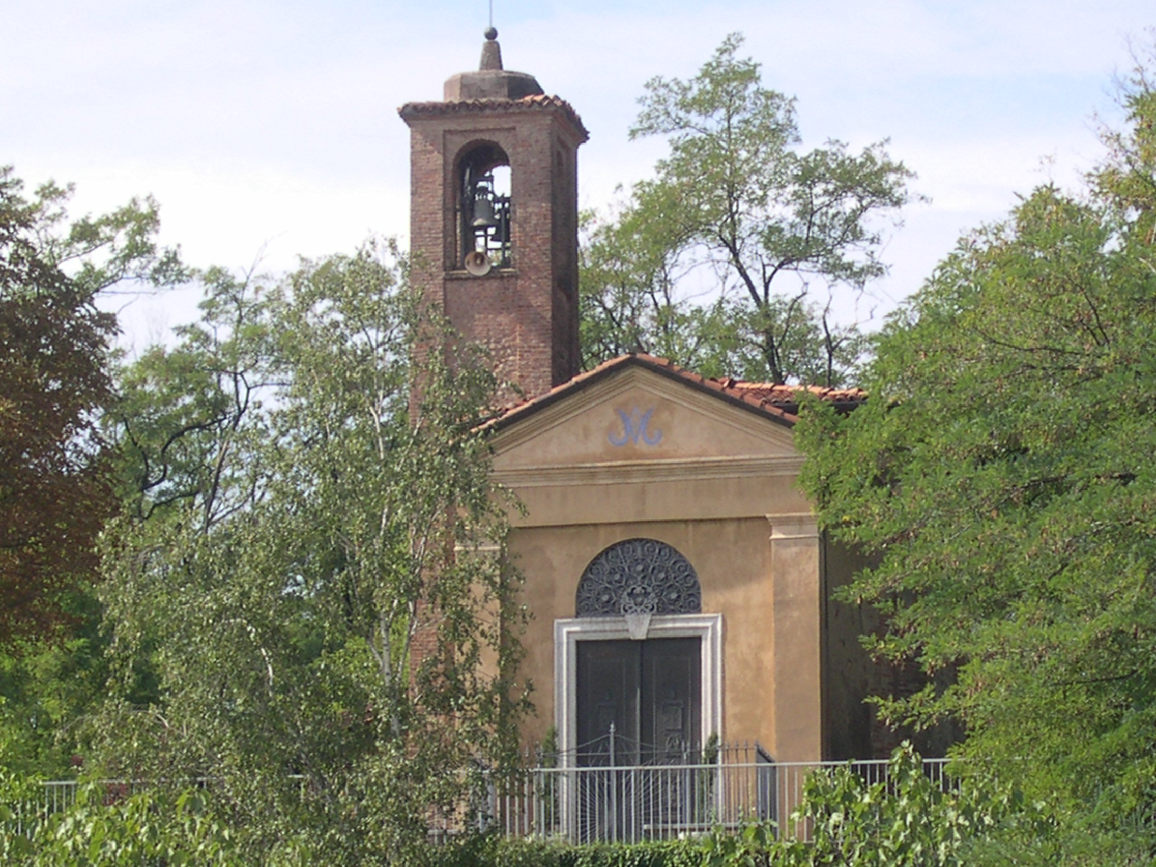 Santuario della Madonna di San Calimero a Bolladello di Cairate (VA). Foto di Niccolò Luoni - 16.09.06.